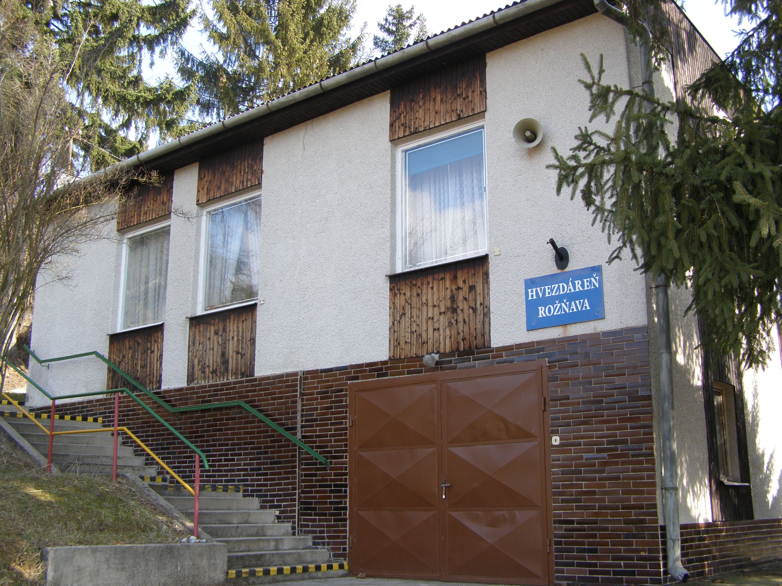 Hvezdáreň Rožňava